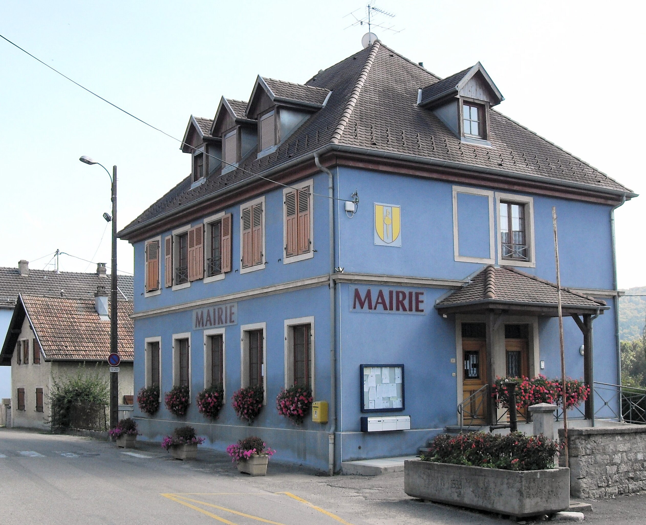 La mairie de Werentzhouse